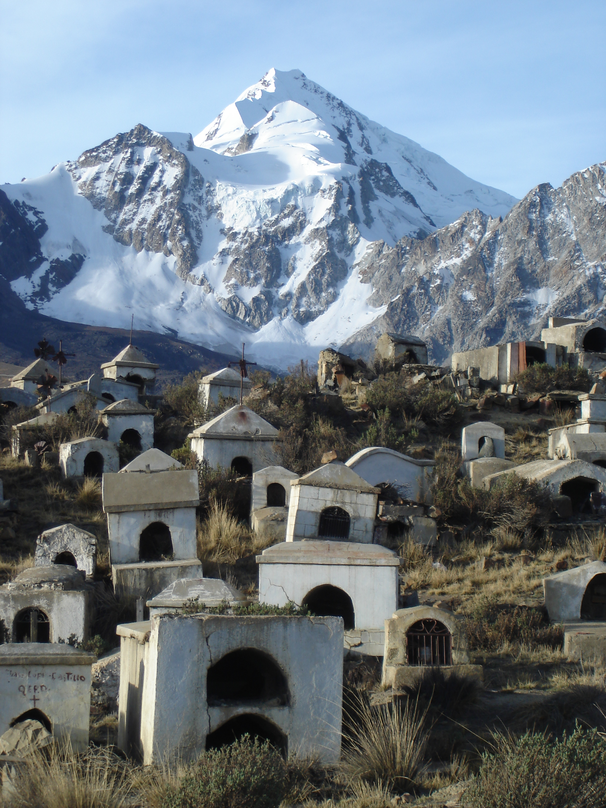 Cementerio de Milluni, Departamento de La Paz, Bolivia en 2008.